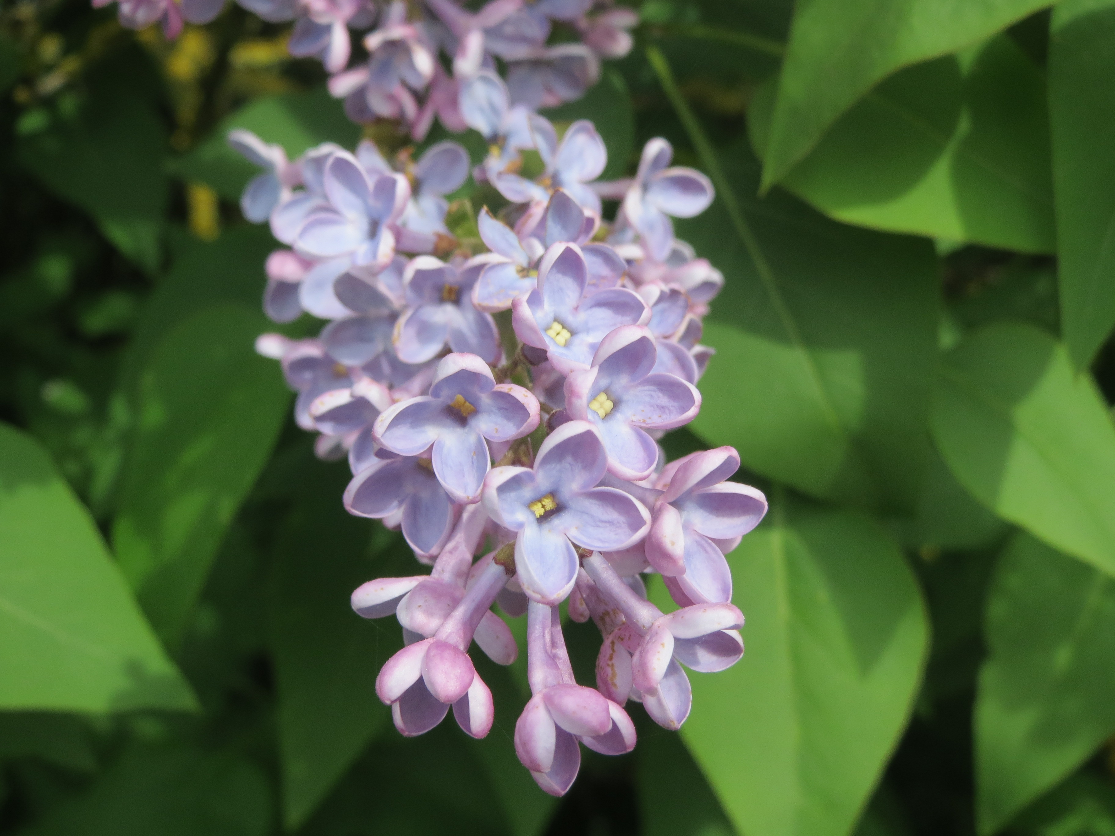 Gemeiner Flieder (Syringa vulgaris) im Hockenheimer Rheinbogen